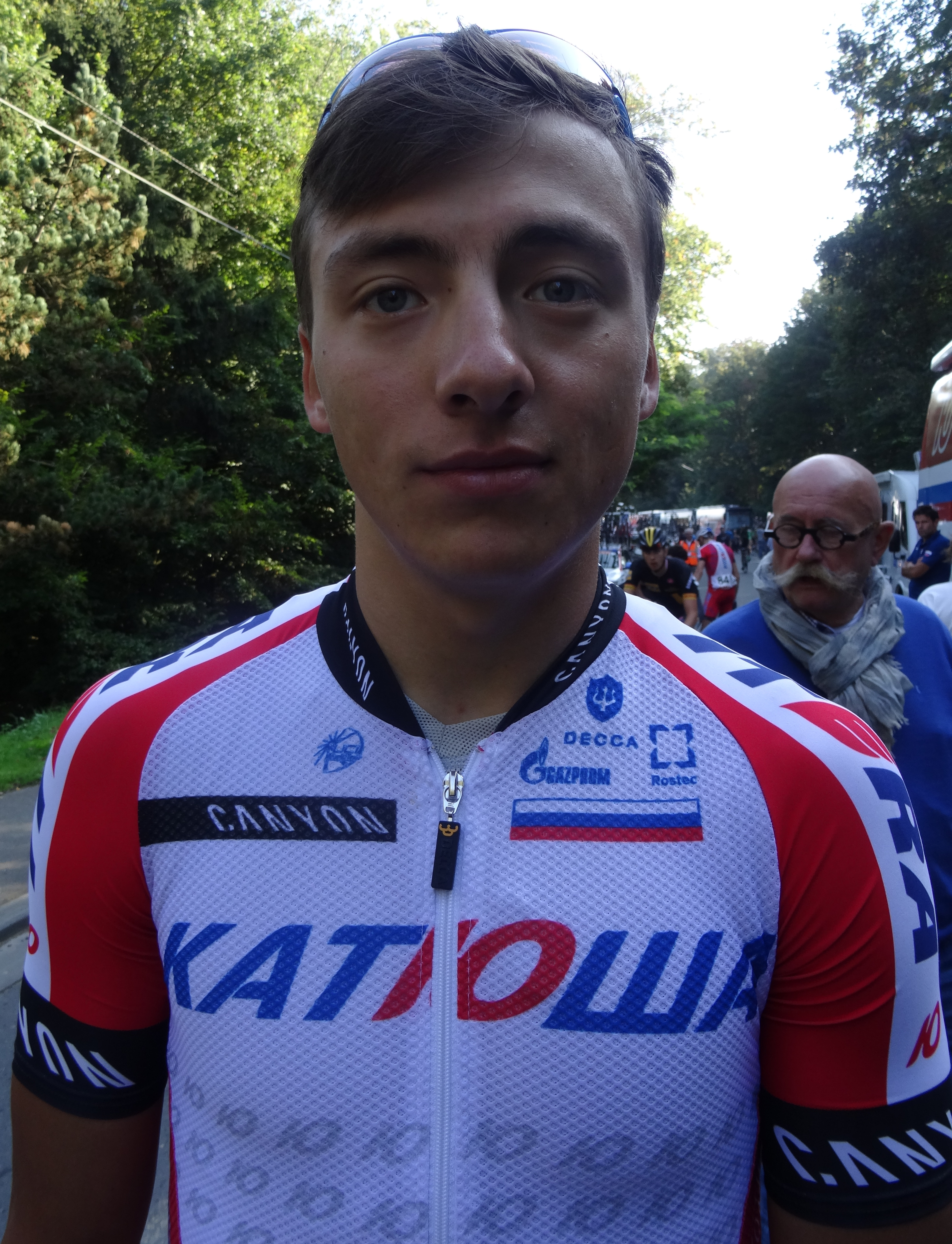 Reportage photographique réalisé le vendredi 3 octobre à l'occasion du départ de la deuxième étape de l'Eurométropole Tour 2014 à Estaimbourg (Estaimpuis), Belgique.